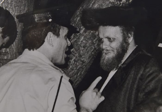 מהומות קולנוע היכל